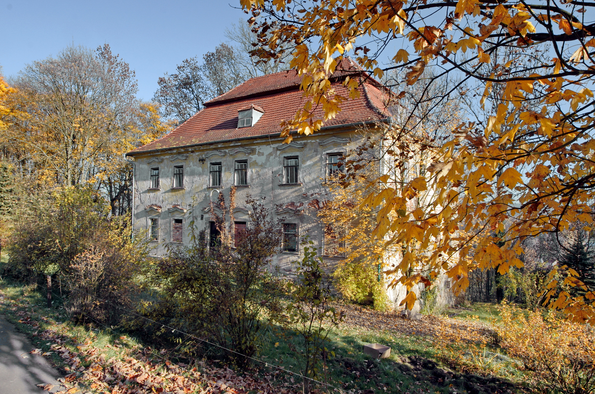 Starý zámek Dasnice, Chlumek 91, Dasnice.